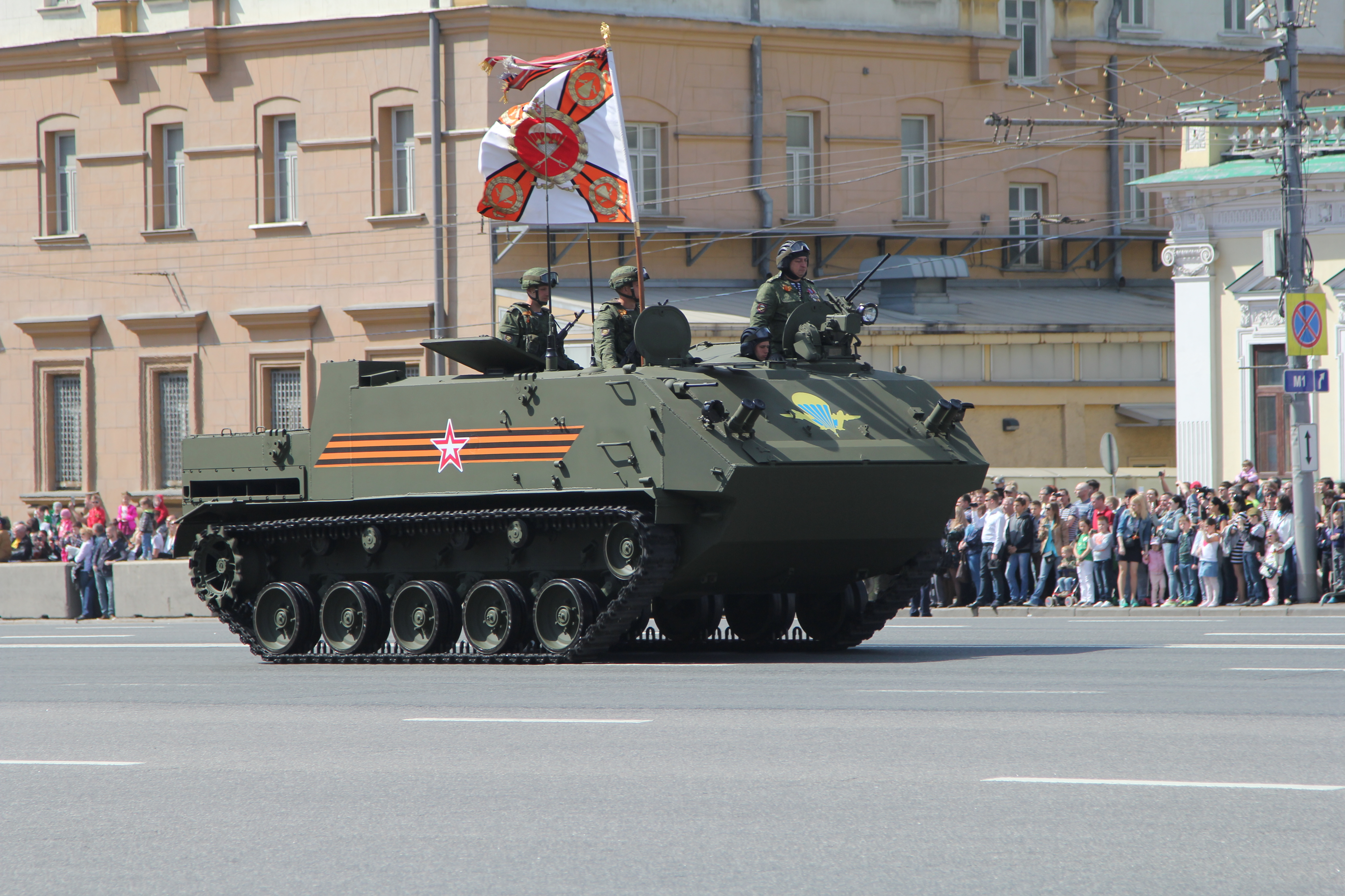 Ракушка (бронетранспортёр)